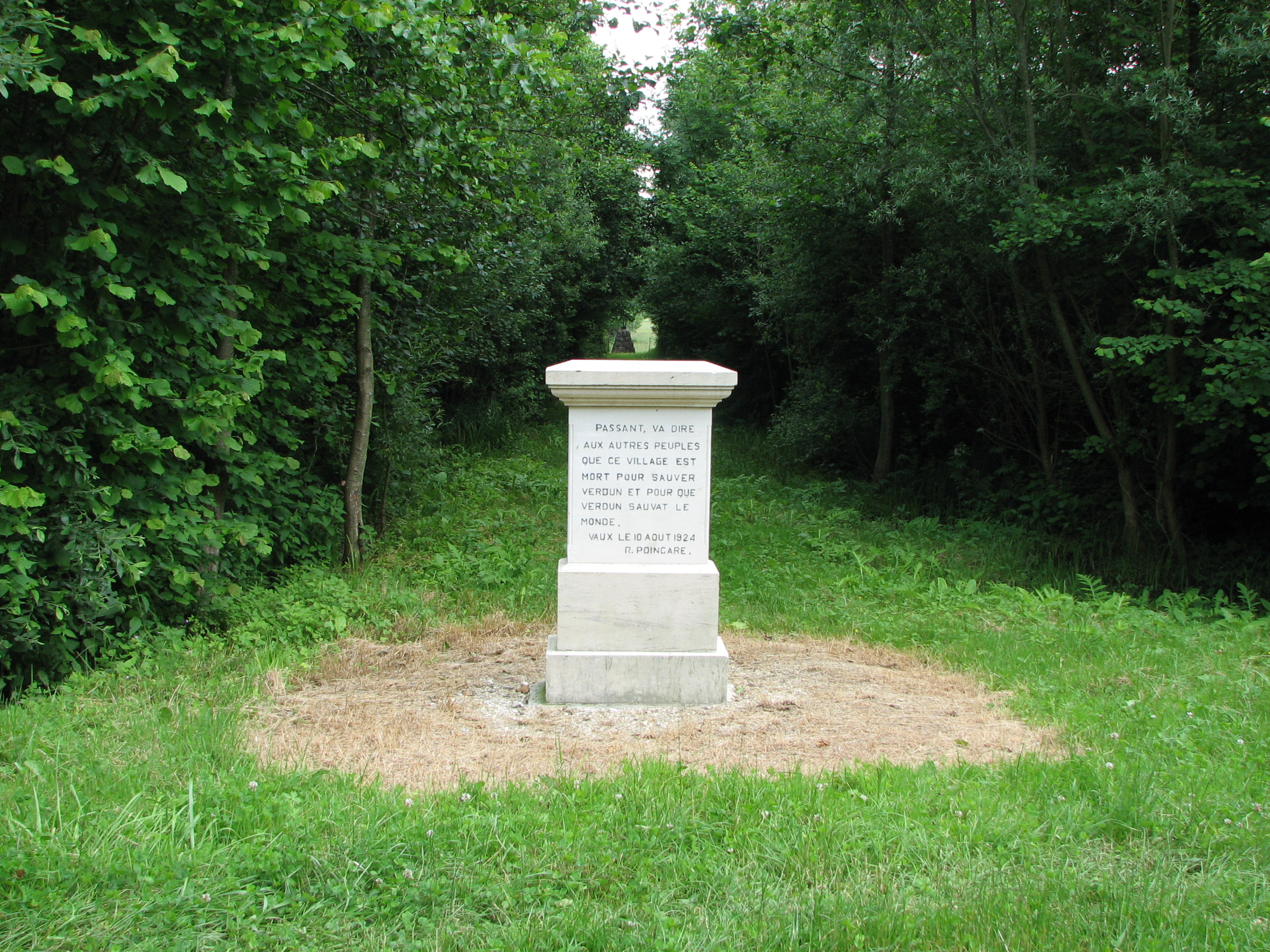 Stèle rappelant la citation de Raymond Poincaré de 1924 sur la destruction du village de Vaux.